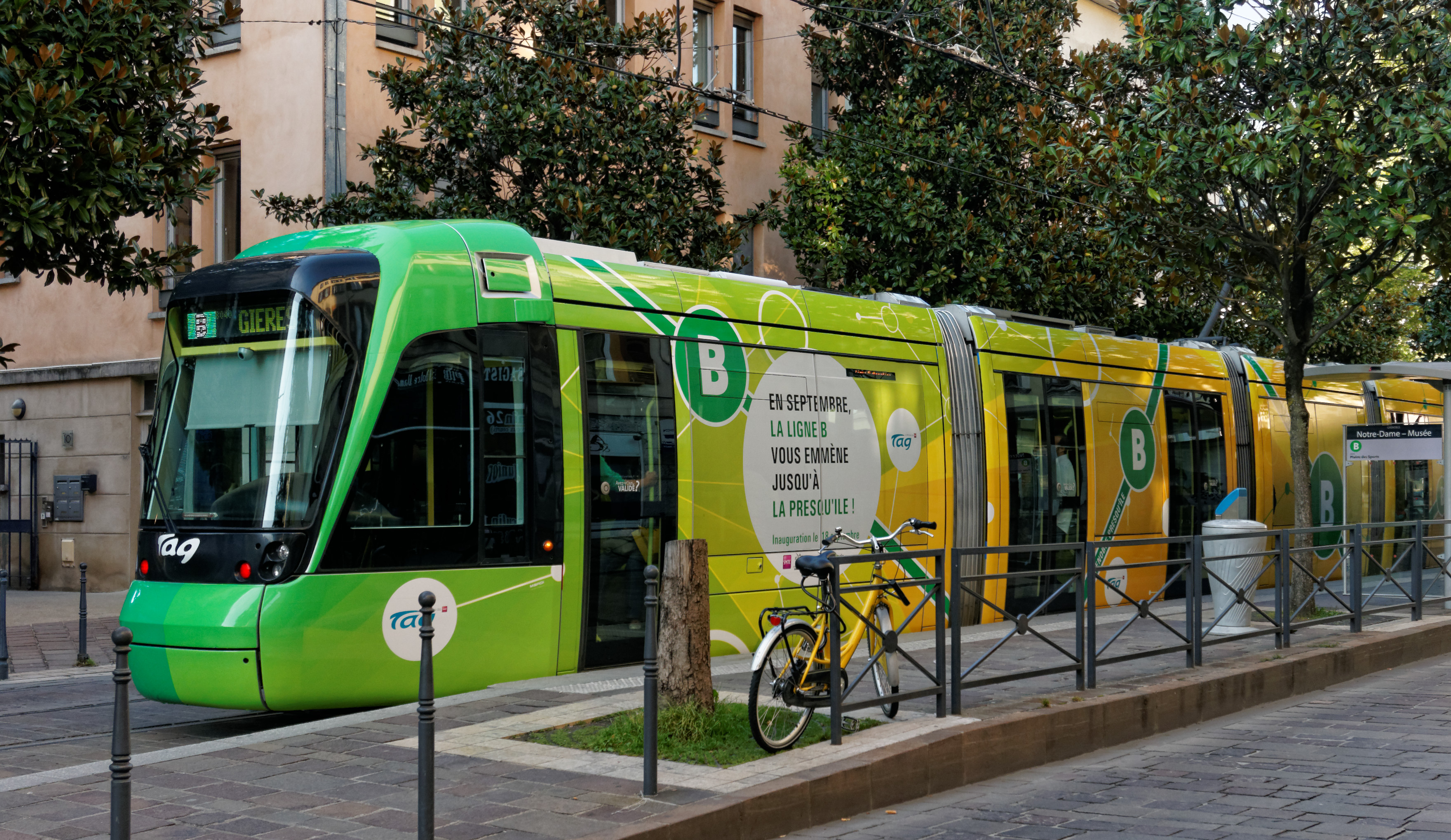 Grenoble Tram Citadis "Prolongation ligne B" à la station Notre-Dame - Musée